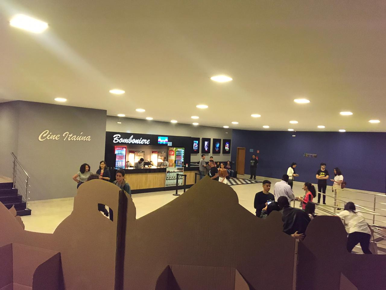 Foyer do Cine Itaúna de Caratinga, MG, pertencente à rede Cine Filmes